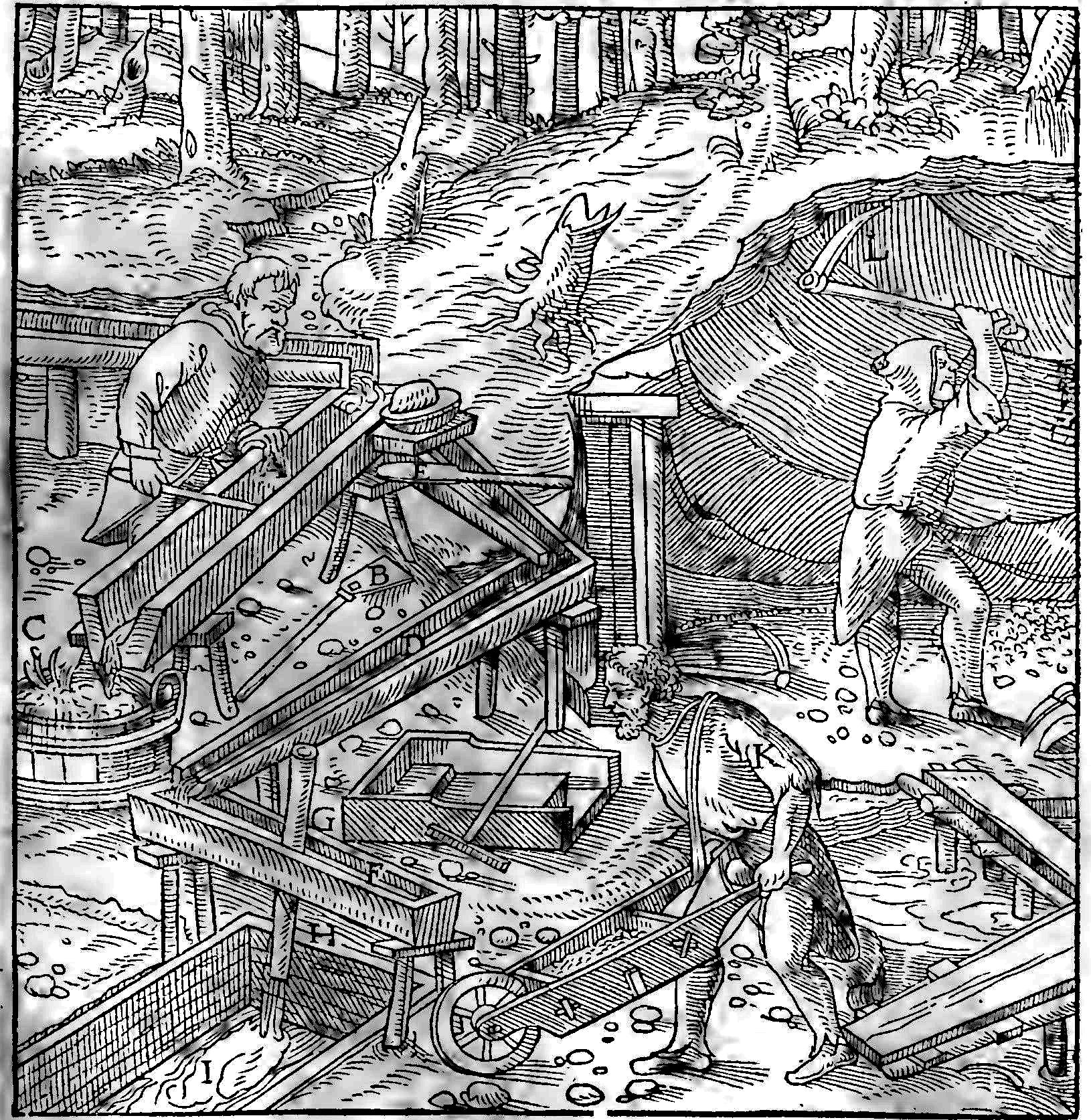 Incisione da De re metallica di Georg Agricola, Basilea, 1556